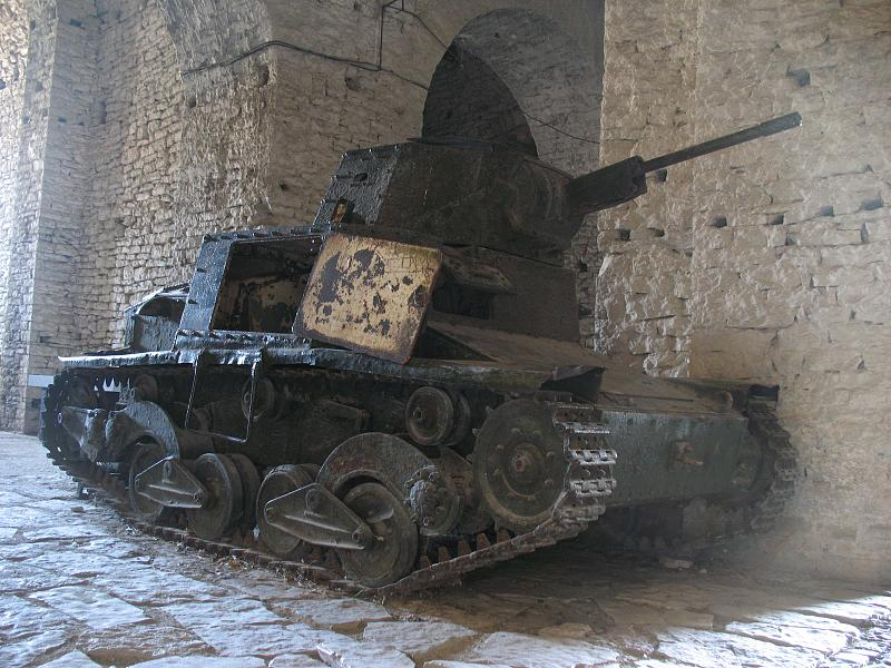 Tank in Gjirokastër